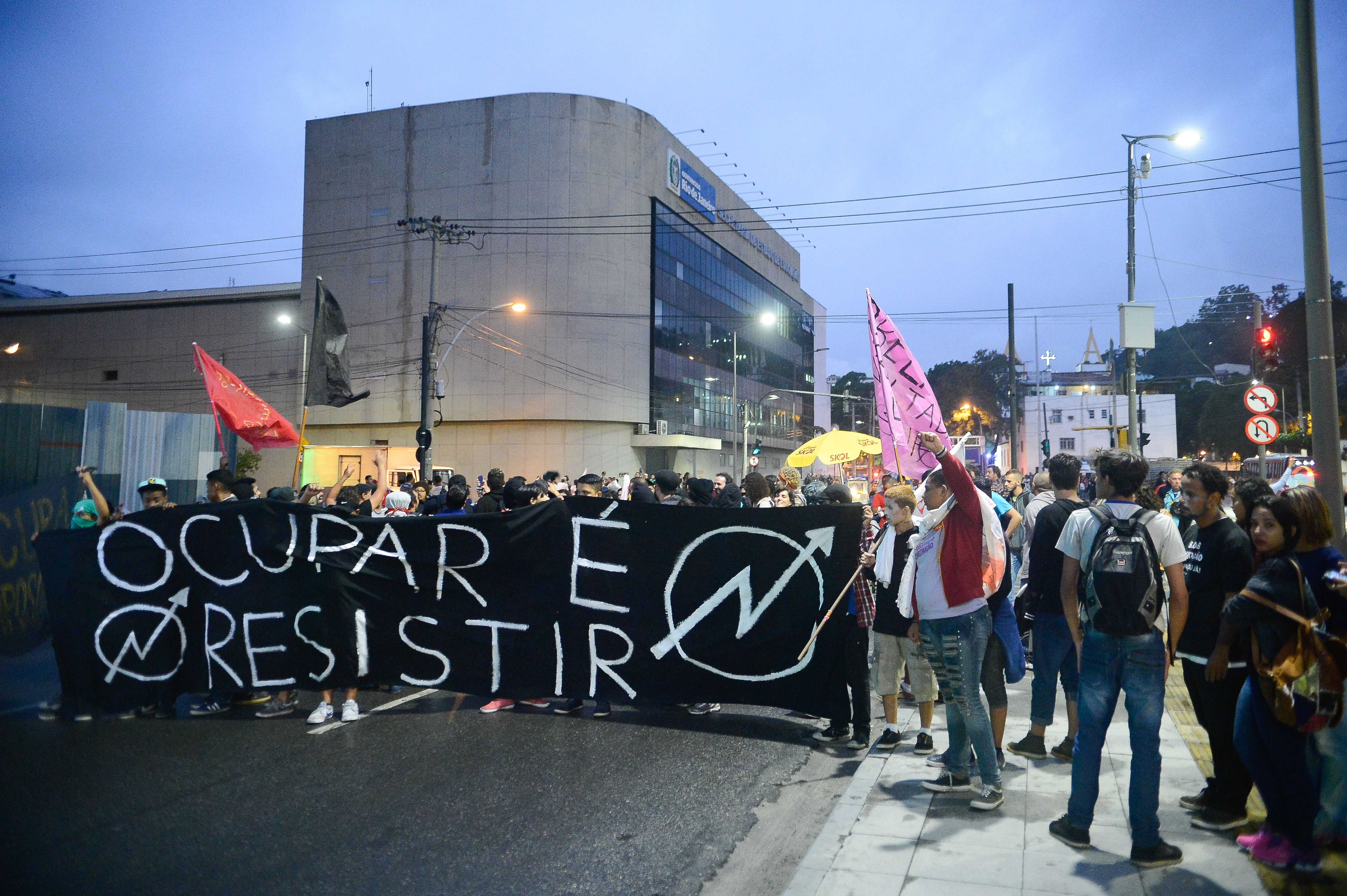 Rio de Janeiro - Professores e estudantes protestam em frente à sede da Secretaria Estadual de Educação, em Santo Cristo, onde fazem ato contra violência da PM nas ocupações e pela reposição salarial dos professores (Tomaz Silva/Agência Brasil)